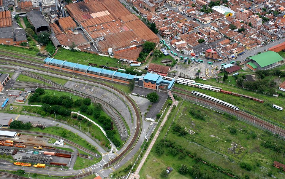 Estación Bello (Metro de Medellín)